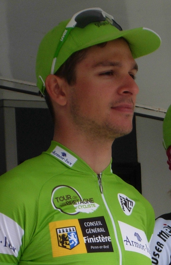 Tour de Bretagne 2013 - Présentation des équipes au départ de la deuxième étape à Ploemel - Équipe Gourmetfein Simplon Depicted person: Jan Sokol